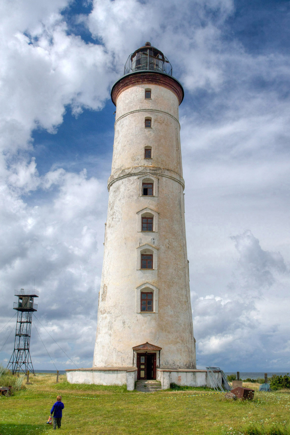 Vilsandi tuletorn